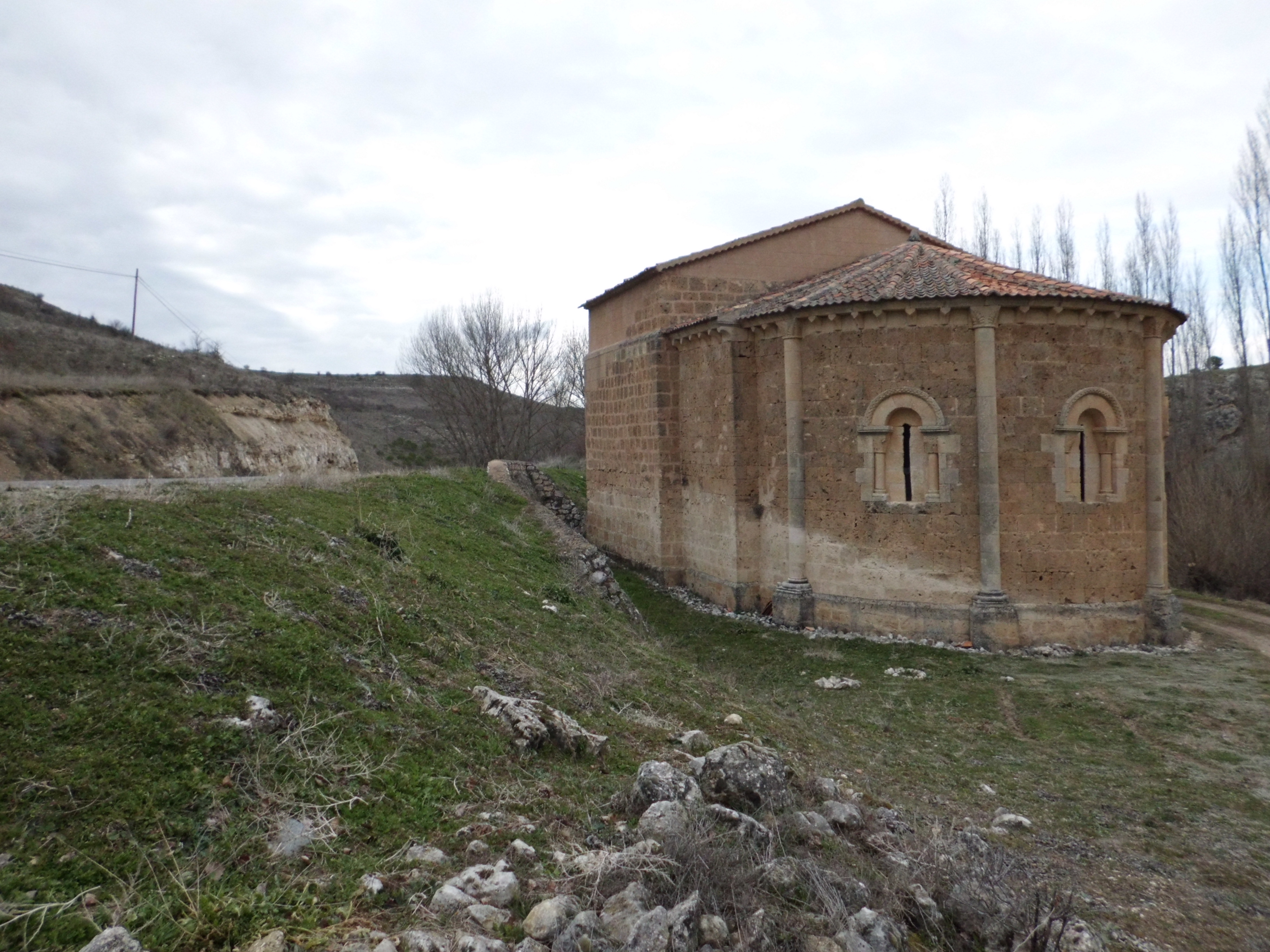 Ermita románica de San Vicente en el término de Fuentesoto en Segovia, España. Finales del siglo XIII y principios del XIV.